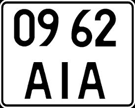 Номерний знак України